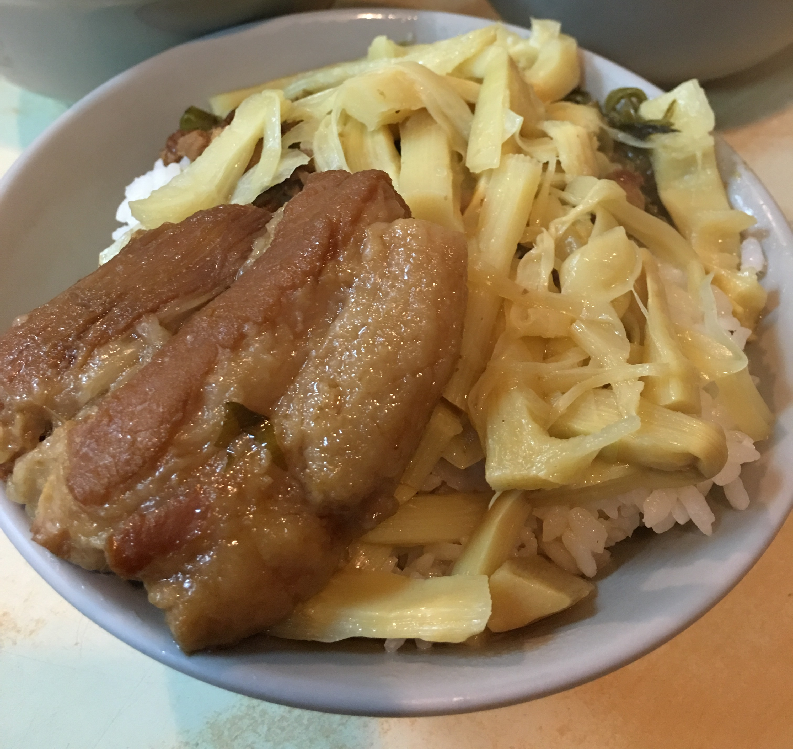 焢肉飯, 施家鮮肉湯圓, 台北